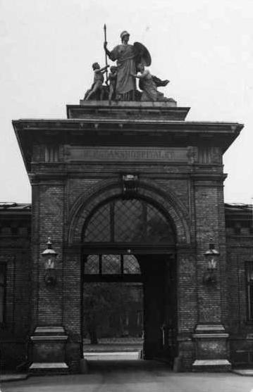 Blegdamshospitalets indgangsportal med skulpturen Athene af Vilhelm Bissen